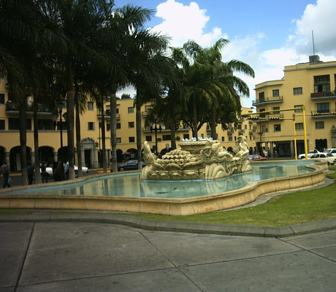 Plaza O´Leary